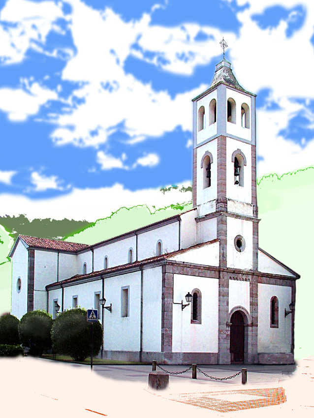 Olloniego /Asturias